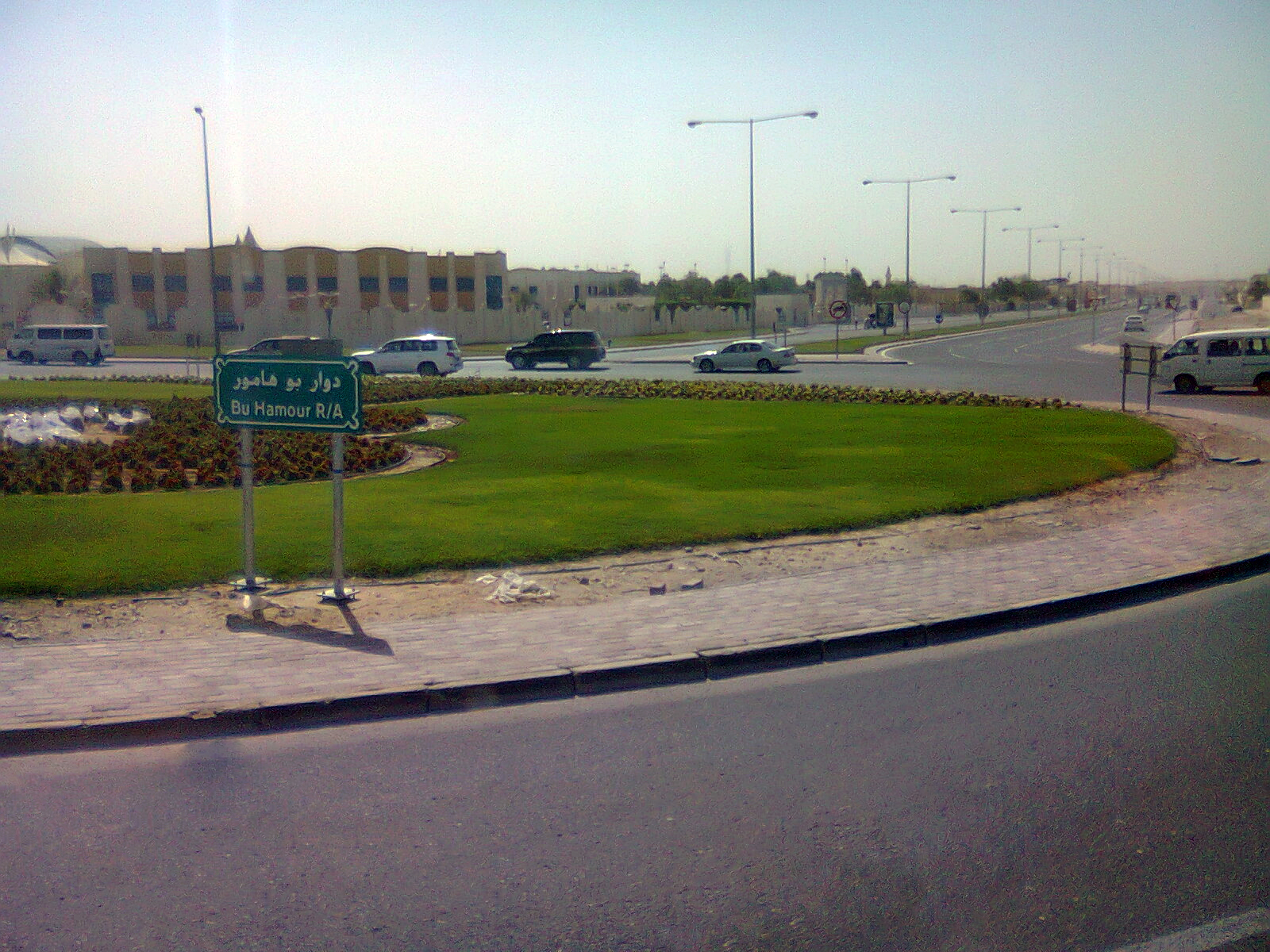 Bu hamour r/a, doha ,qatar